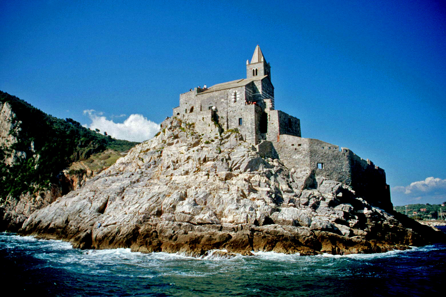 Porto Venere 2004